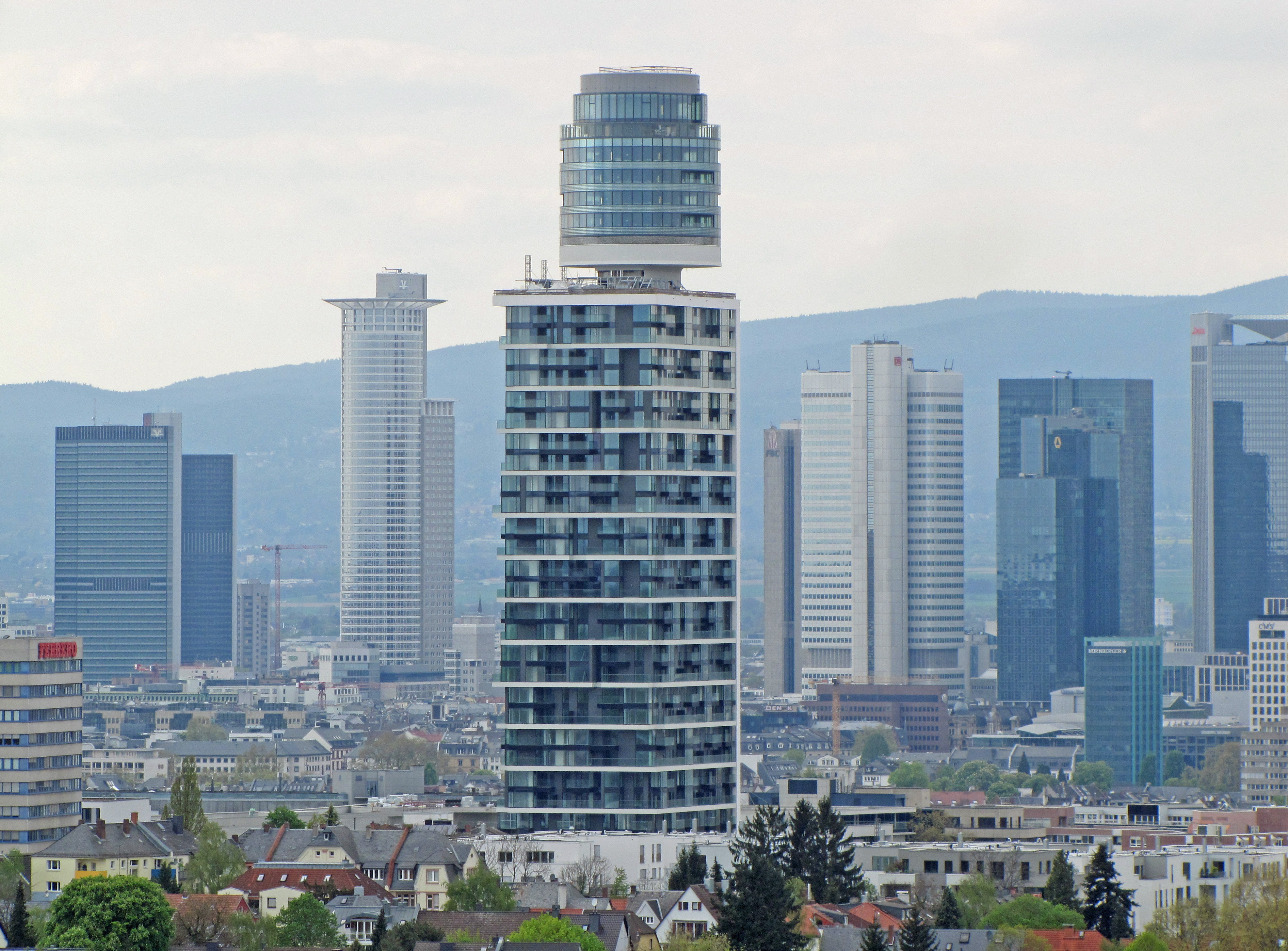 Der Neue Henningerturm kurz vor seiner Fertigstellung im April 2017 vom Goetheturm aus gesehen.